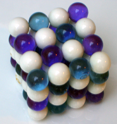 Knikkers stapellen *Props*